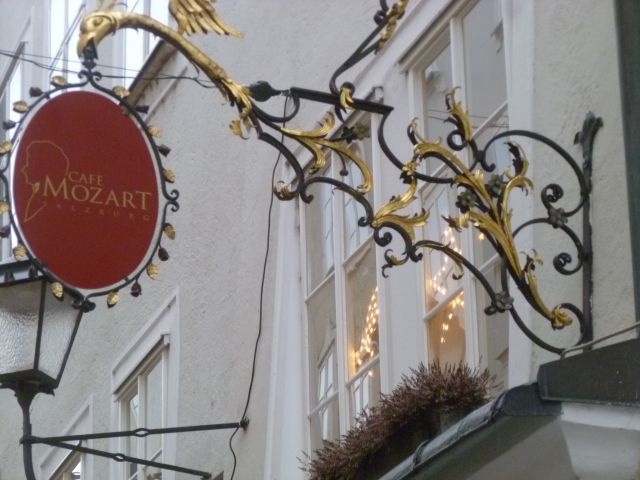 Café_Mozart_-_Schild